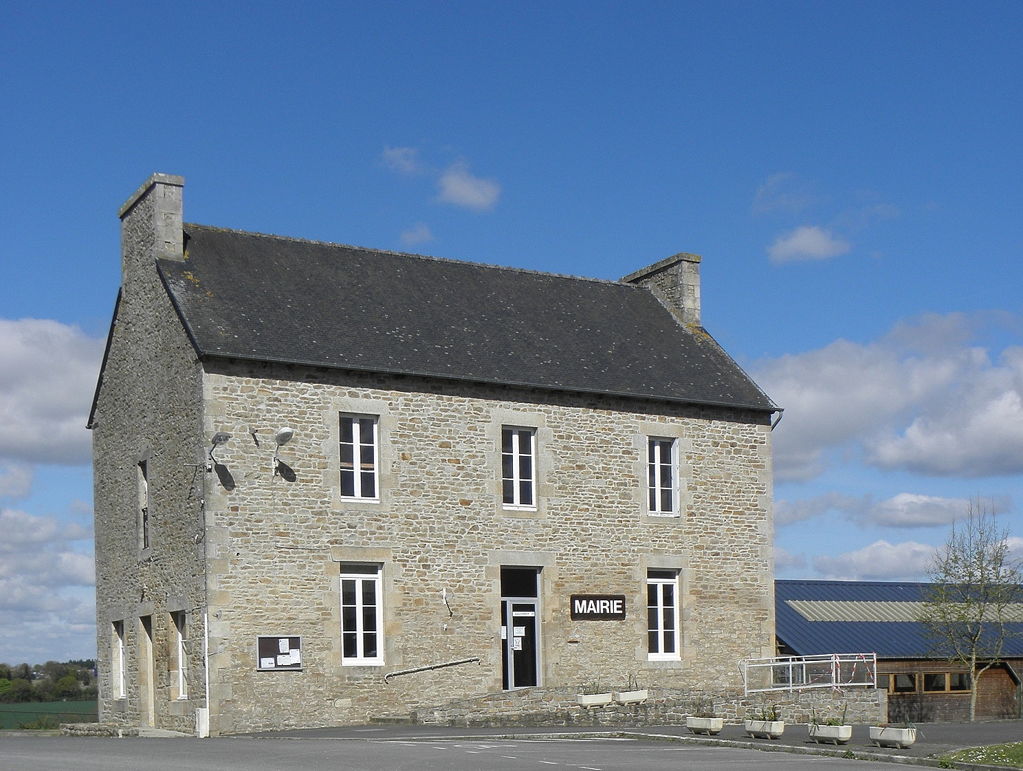 Mairie de Trédias (22).